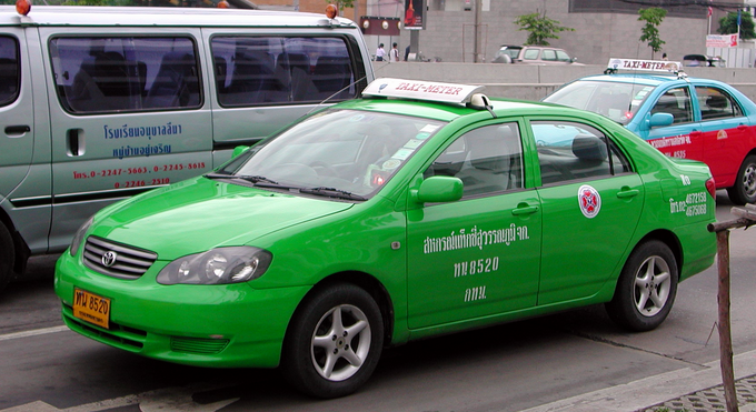 Waerth 30 aug 2004 04:04 (CEST)